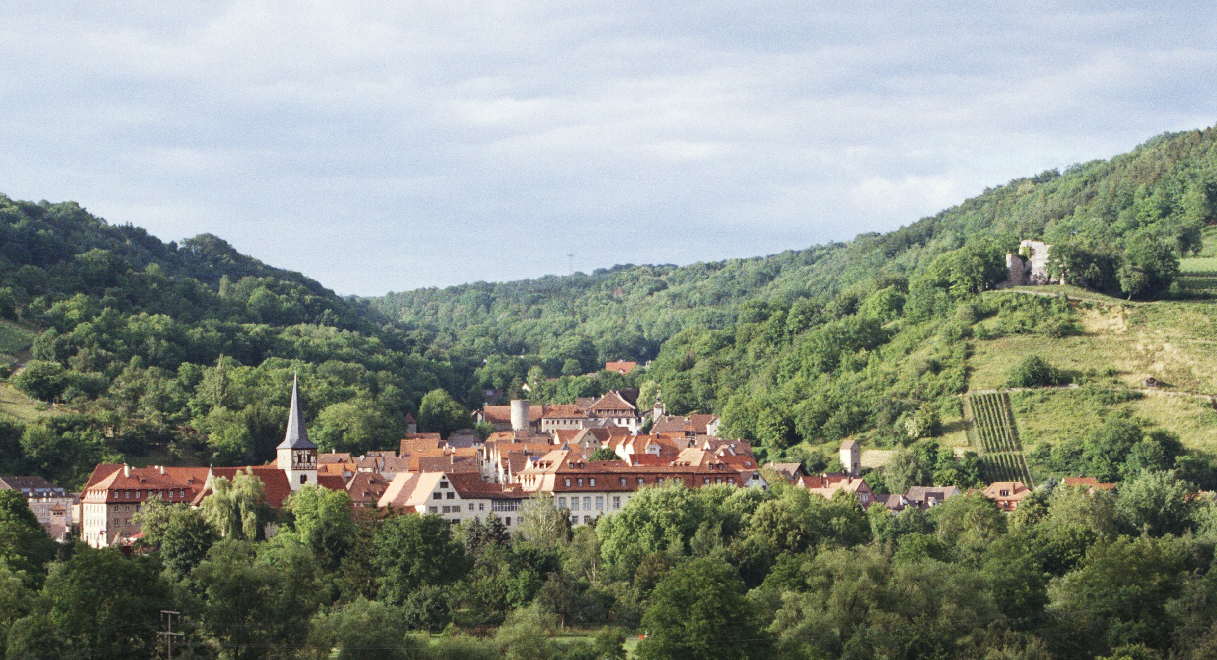 Ingelfingens Altstadt und die Burgruine Lichteneck vom Nordhang des Kochertals aus gesehen.